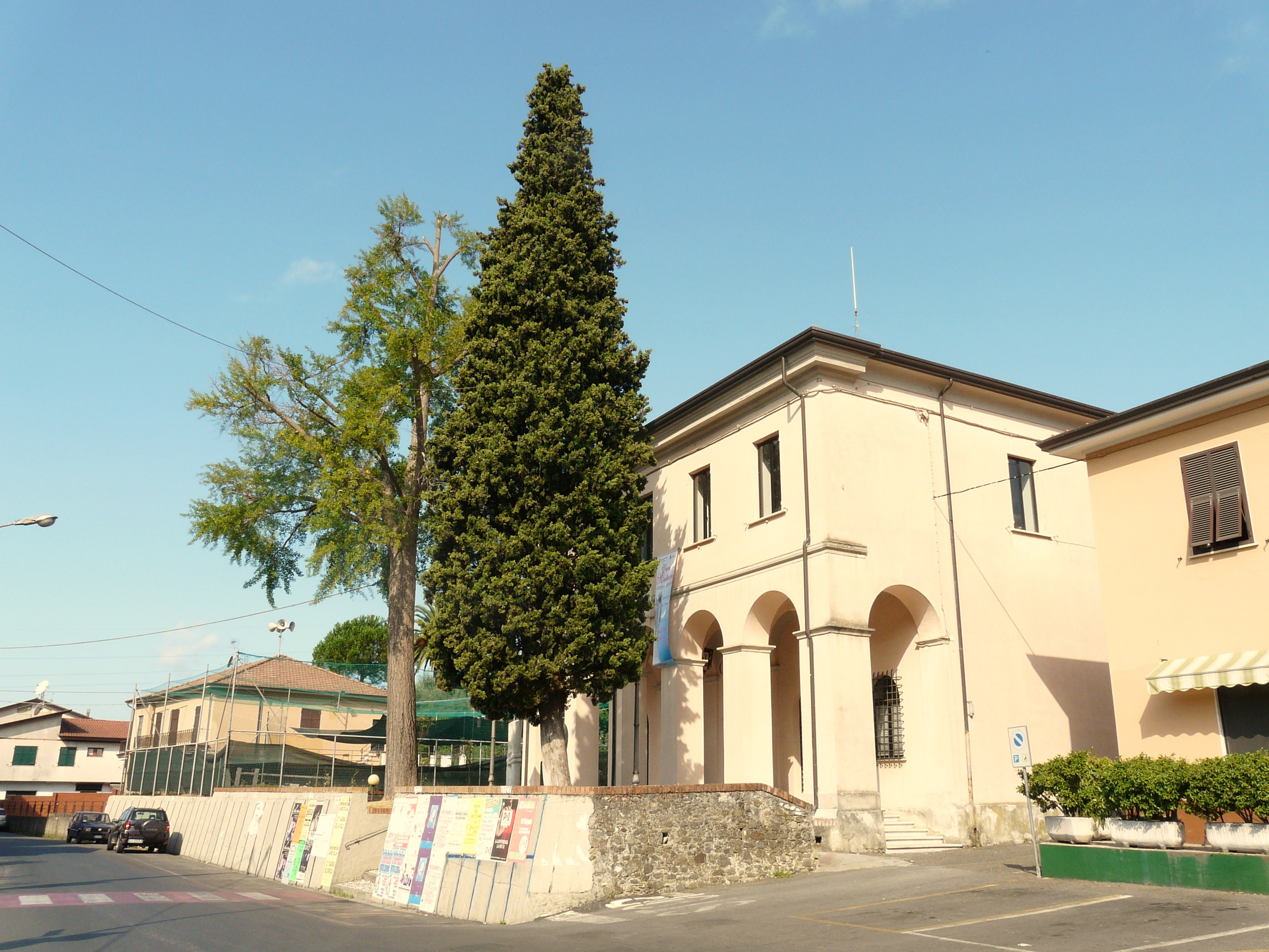 Municipio di Ortonovo, Liguria, Italia